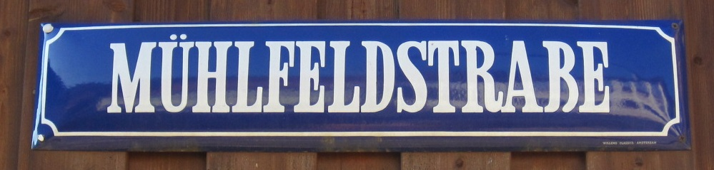 Straßenschild "MÜHLFELDSTRAẞE" in Heiligkreuzsteinach mit großem ß